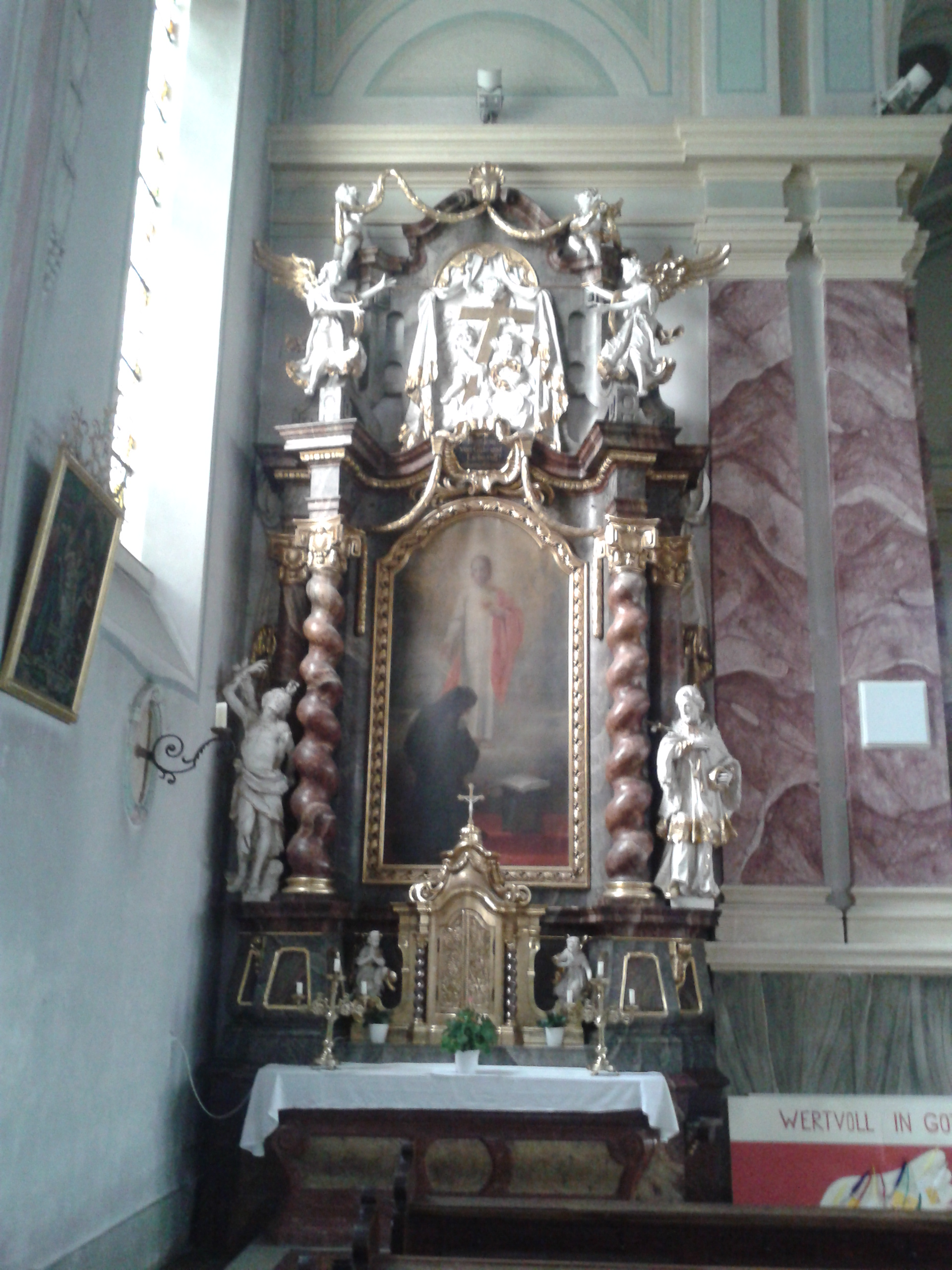 Stadtpfarrkirche St. Josef (Reinhausen): Herz-Jesu-Seitenaltar (nördl. Querhaus)